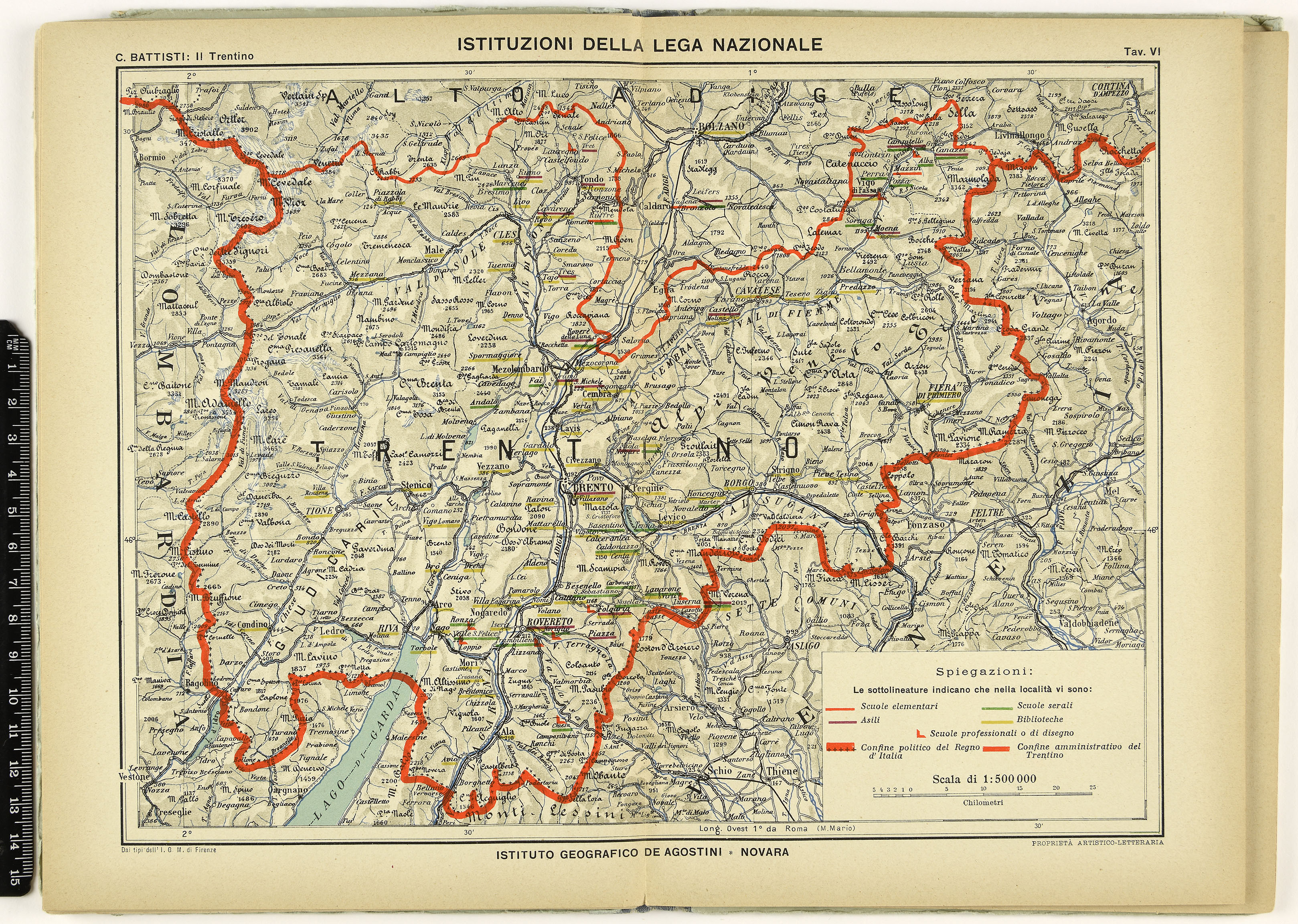 Immagini da Il Trentino, cenni geografici, storici, economici, 1915, Cesare Battisti, 1915